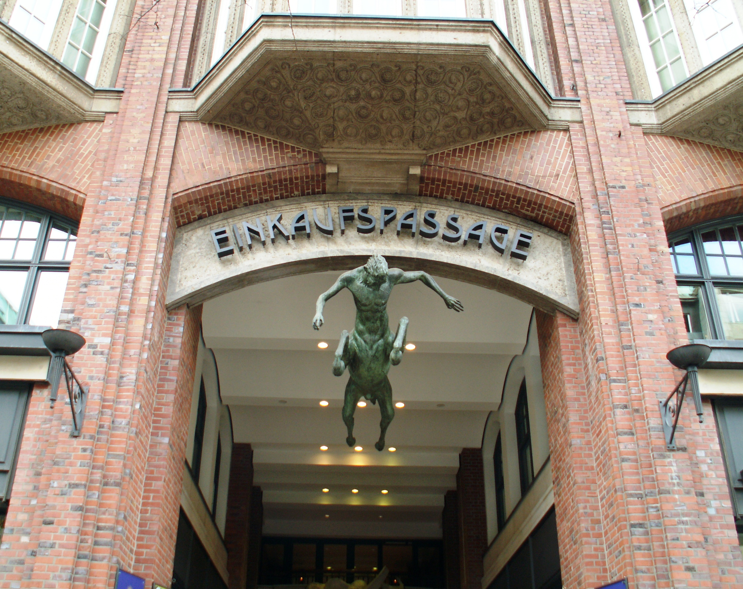 Eingangportal zur Einkaufspassage im Levantehaus in Hamburg, Deutschland mit Zentaurenfigur. Entree of the shopping mall Levantehaus in Hamburg, Germany, with centaur.